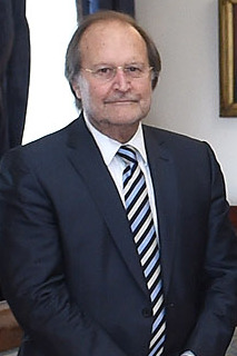 Gobierno de Chile